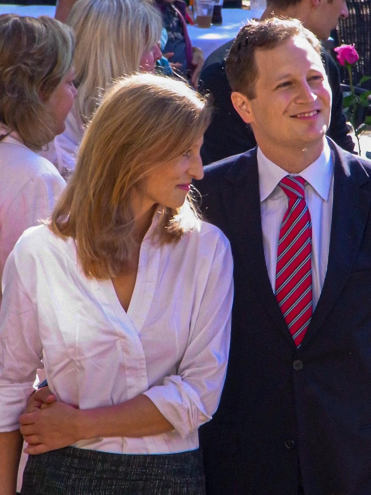 Georg Friedrich Prinz von Preußen mit seiner Ehefrau Sophie beim Hohenzollerntag 2011 auf Burg Hohenzollern